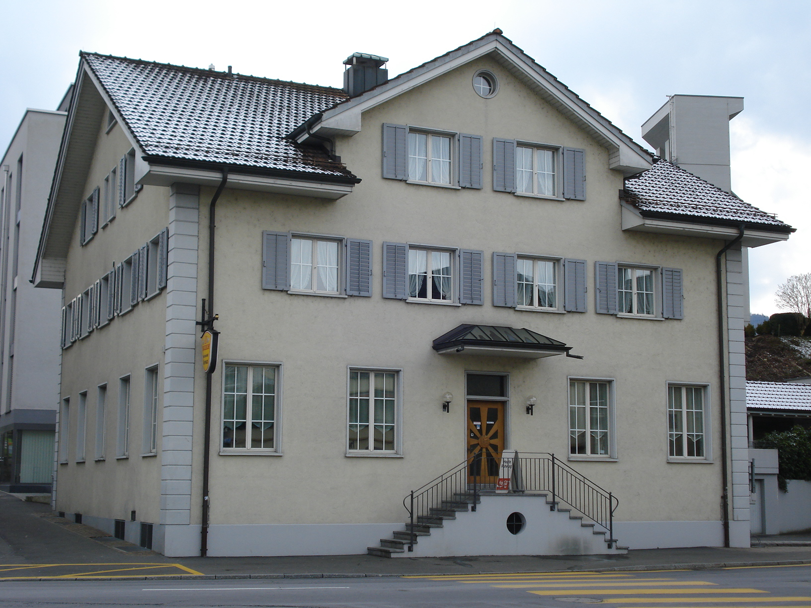 Hotel Kreuz Rotkreuz